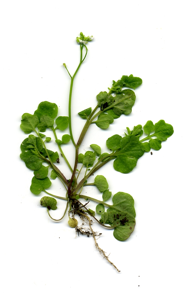 Cardamine hirsuta plant